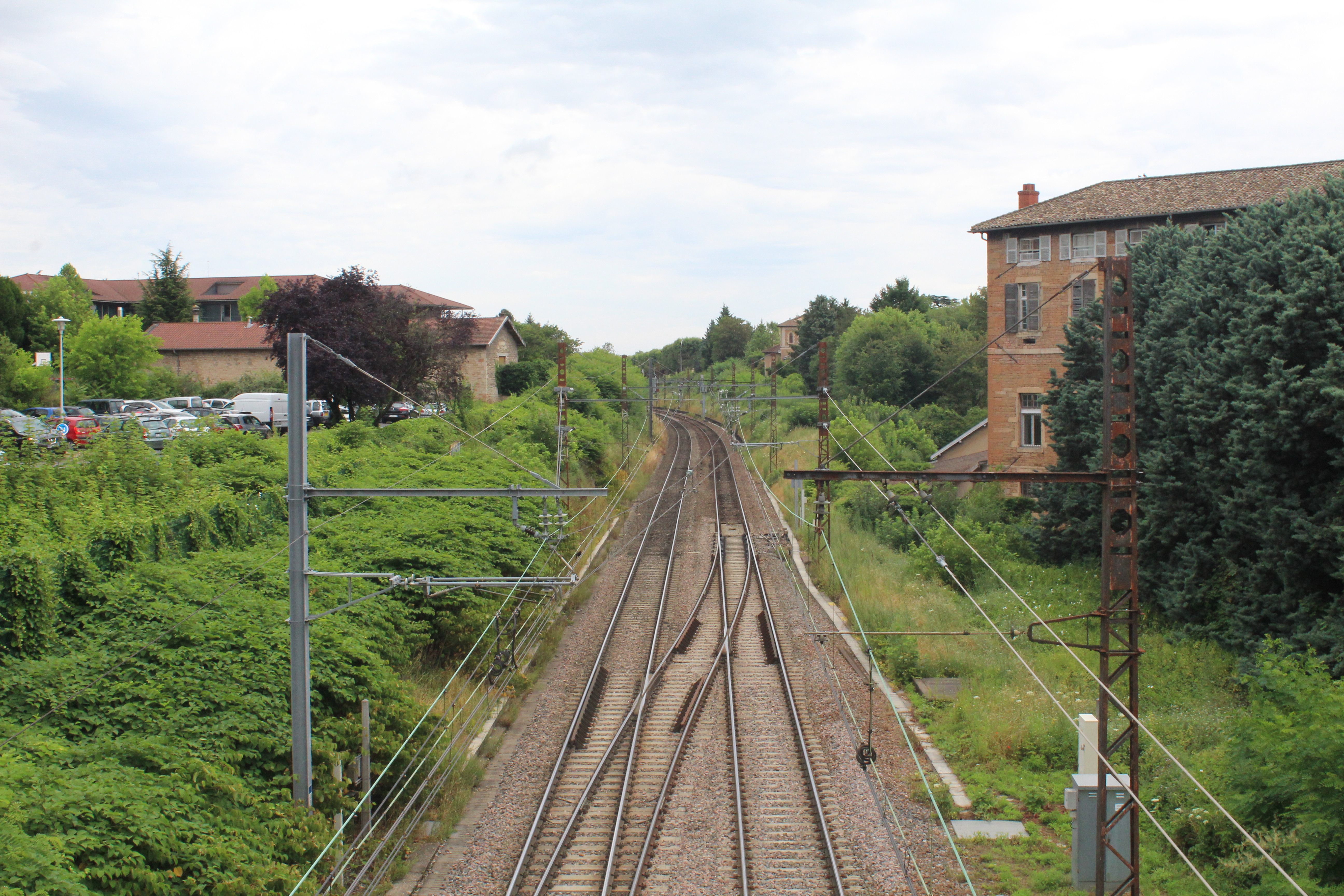 Voie ferrée vers l'Hôtel-Dieu de Mâcon.